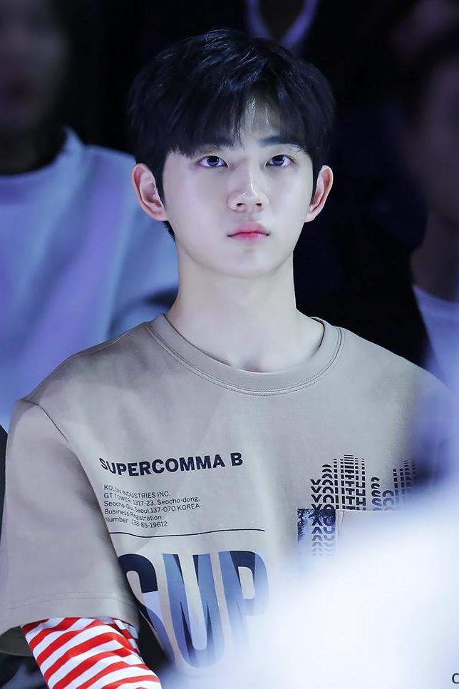 171018_헤라 서울패션위크 슈퍼콤마비